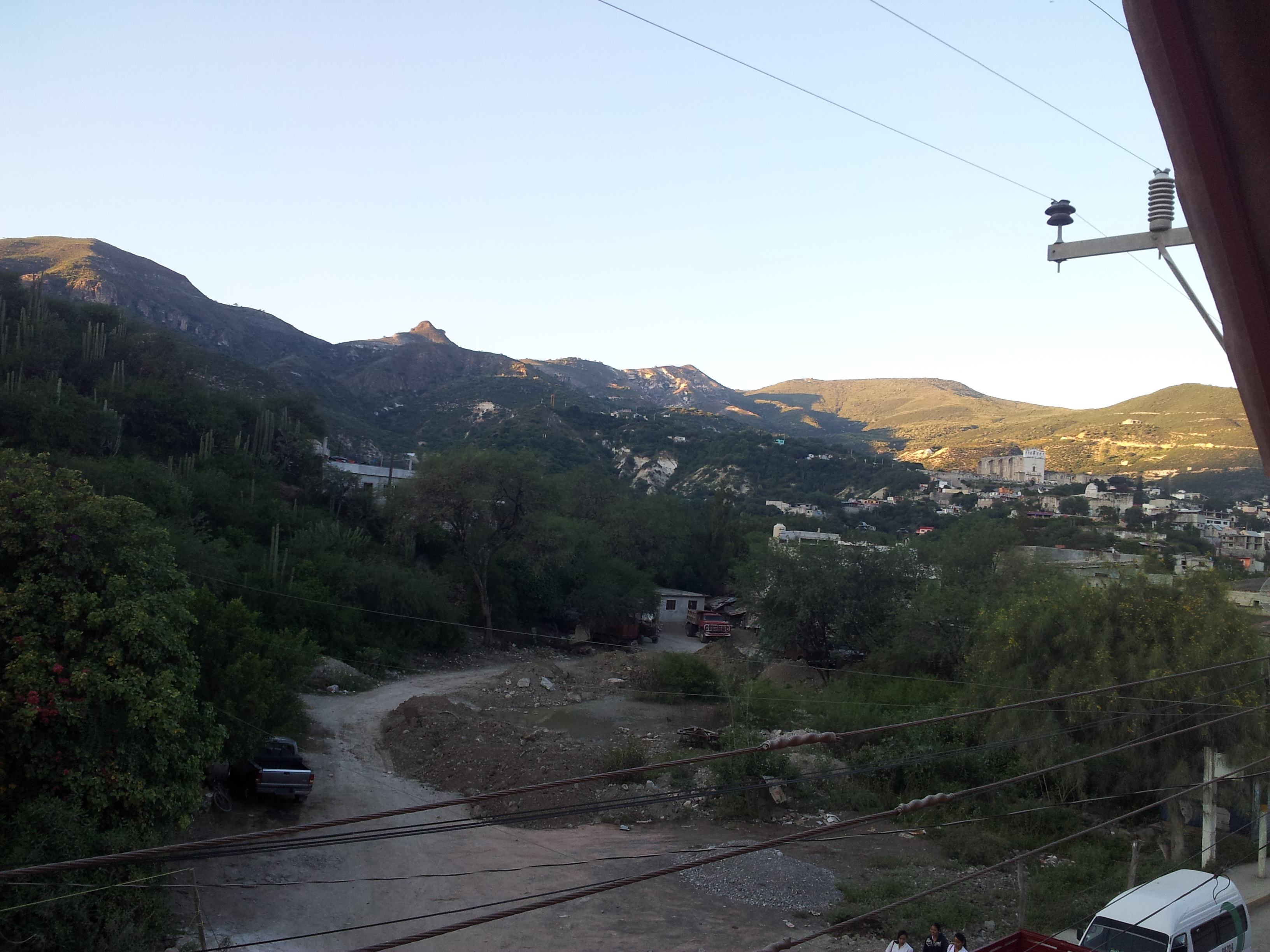 Tepeyacapa, Metztitlán, Hgo., Mexico